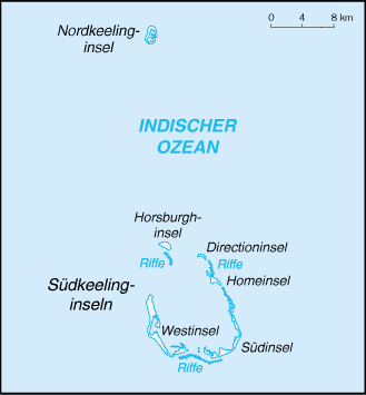 Karte der Kokosinseln, übersetzt